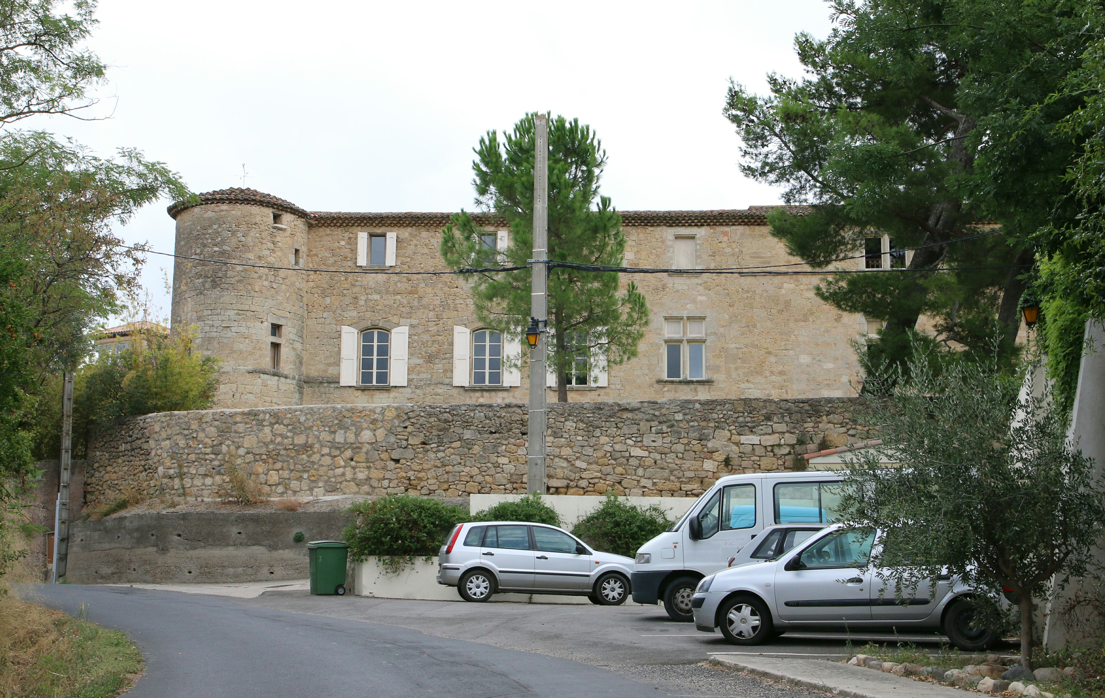 château de Puilacher